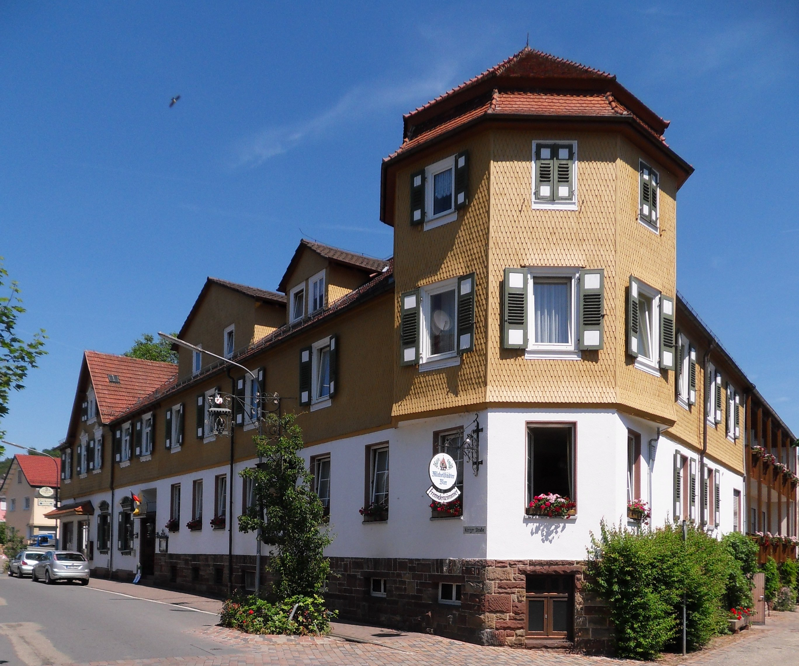 Das stattliche Gasthaus Zur Krone in der Königer Straße in Zell im Odenwald steht unter Denkmalschutz